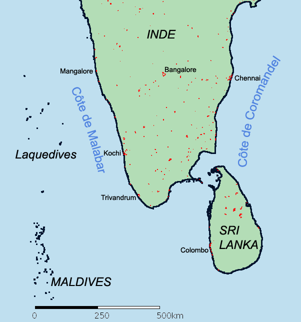 Les côtes de Coromandel et de Malabar en Inde du Sud Complété par Shiva-Nataraja à partir d'un fond de carte conçu par 2005, Gérald Anfossi